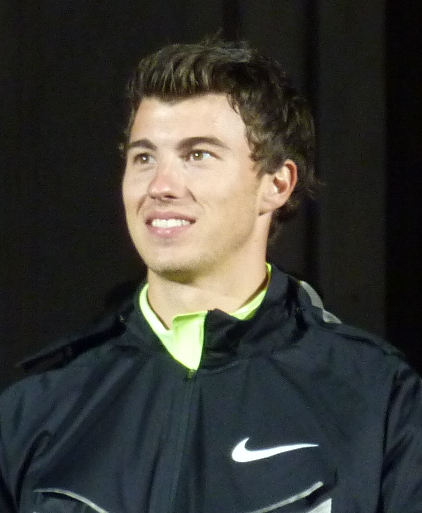 Steven Lewis 2012 in München beim Jump & Fly